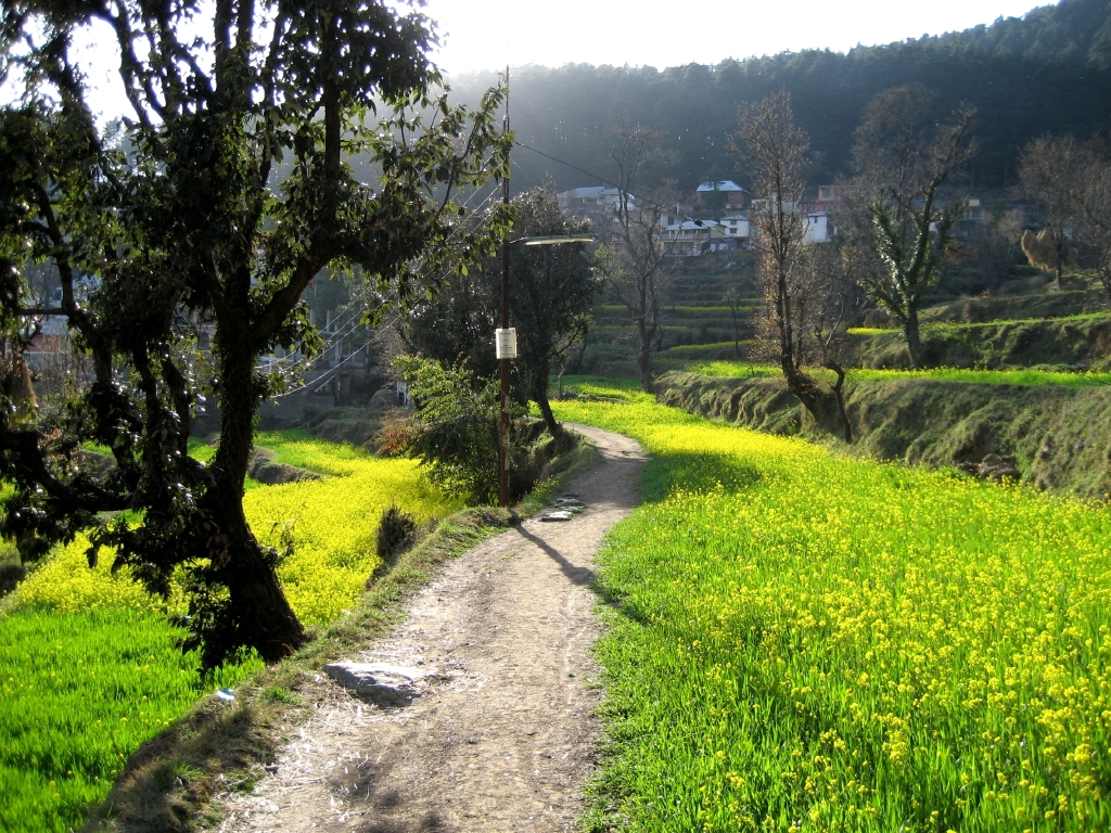 Mustard fields in Dharamkot, Dharamsala.